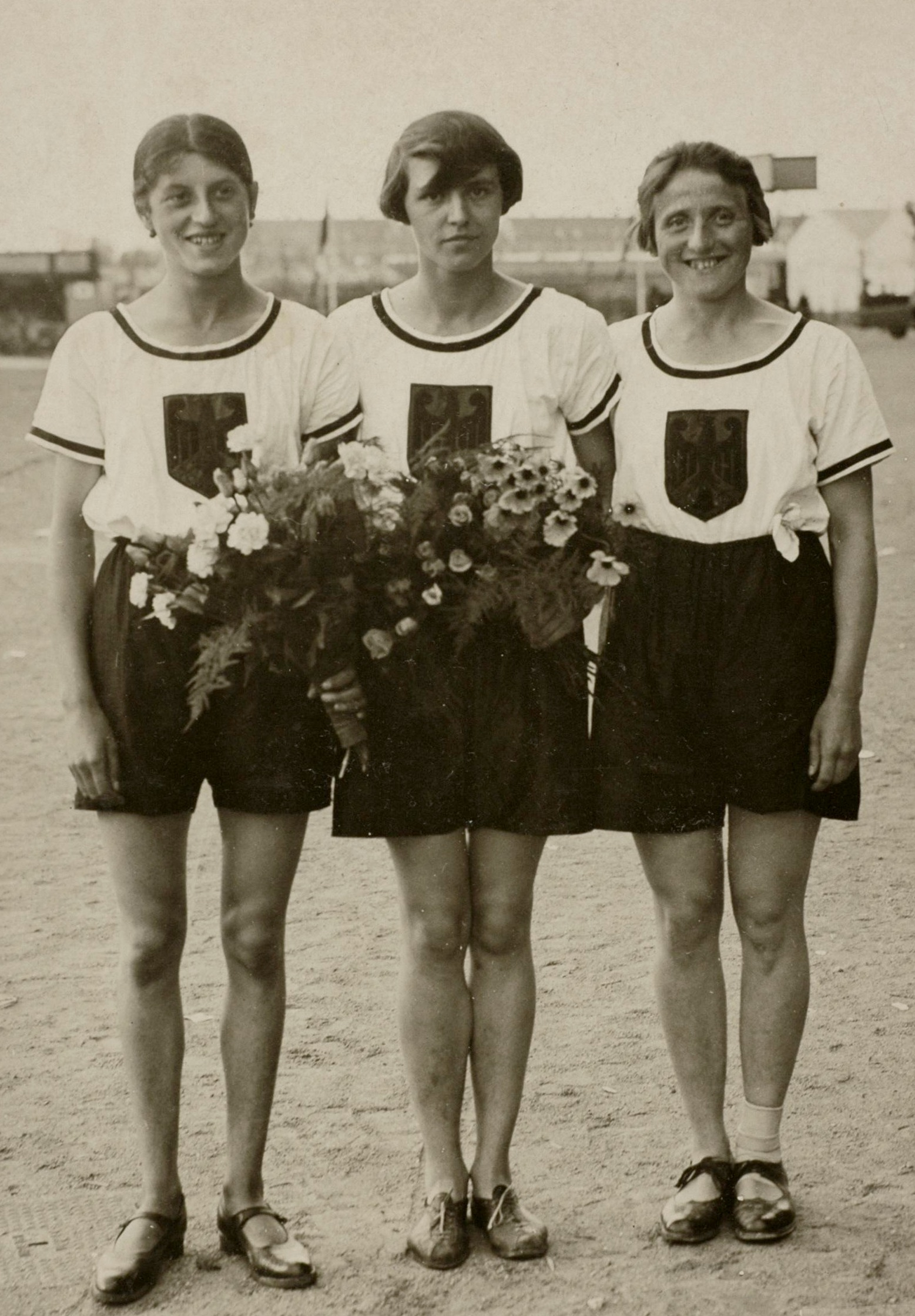 Sport. Sport, Olympische Spelen Amsterdam, 1928 : De Duitse deelneemsters aan de 800 meter hardlopen (vrouwen) : Vlnr M. Dollinger, Lina Radke (olympisch kampioene) en E. Wewer.